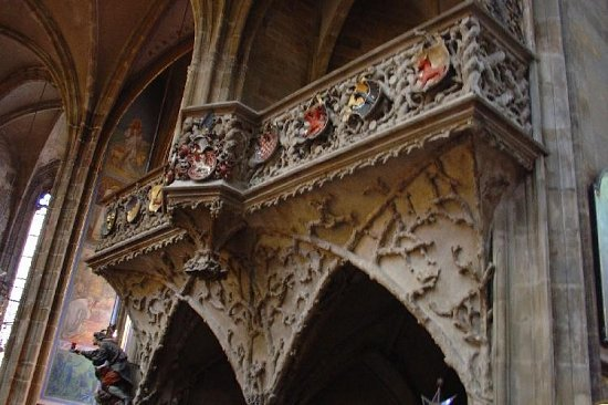 oratoř